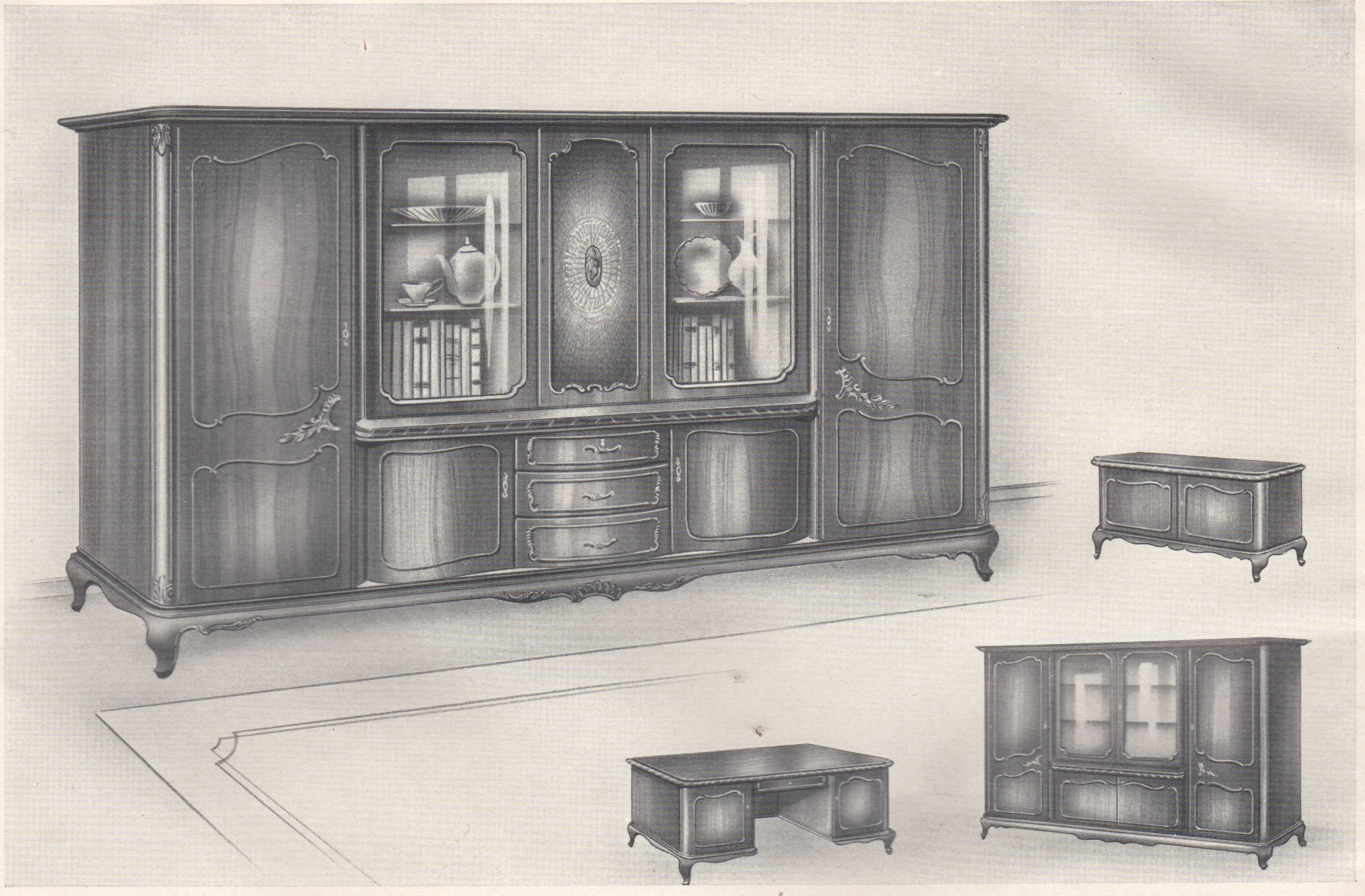 Modellreihe "Luton", Nußbaum seidenmatt, 1950er Jahre, J. Günther - Möbelfabrik - Steinheim/Westfalen